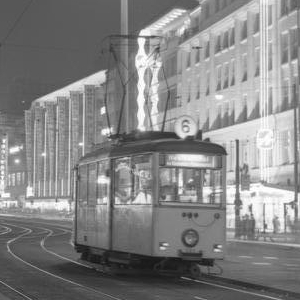 Title: Frankfurt/Main, Hauptbahnhof Factual corrections and alternative descriptions are encouraged separately from the original description. Additionally errors can be reported at this page to inform the Bundesarchiv. Original historic description: Stadtaufnahmen Frankfurt/Main Hauptbahnhof und Umgebung Das Bild zeigt NICHT den Hauptbahnhof, sondern einen Blick von der Konstablerwache nach Westen in die Zeil. Links ist das Bienenkorbhaus zu sehen, in der Mitte und rechts die Kaufhäuser M.Schneider und Ammerschläger auf der Zeil.